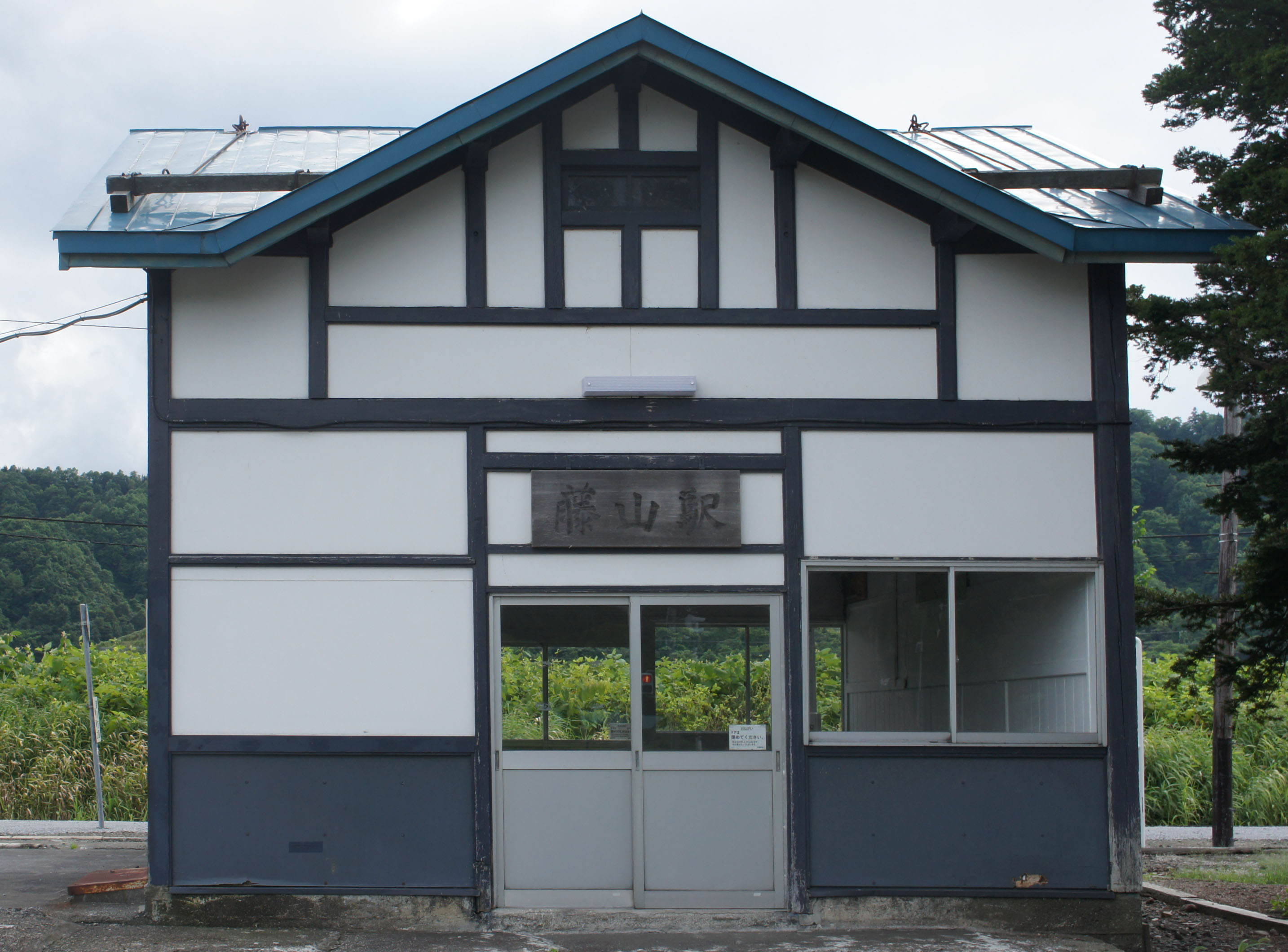 JR留萌本線・藤山駅の駅舎